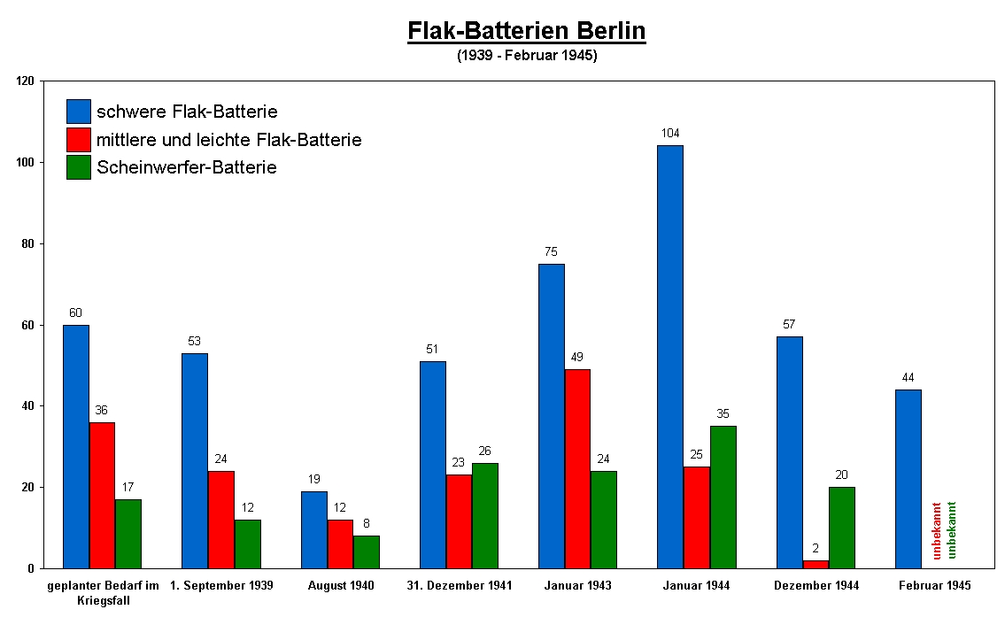 Anzahl der eingesetzten Flak-Batterien in Berlin von 1939 - 1945